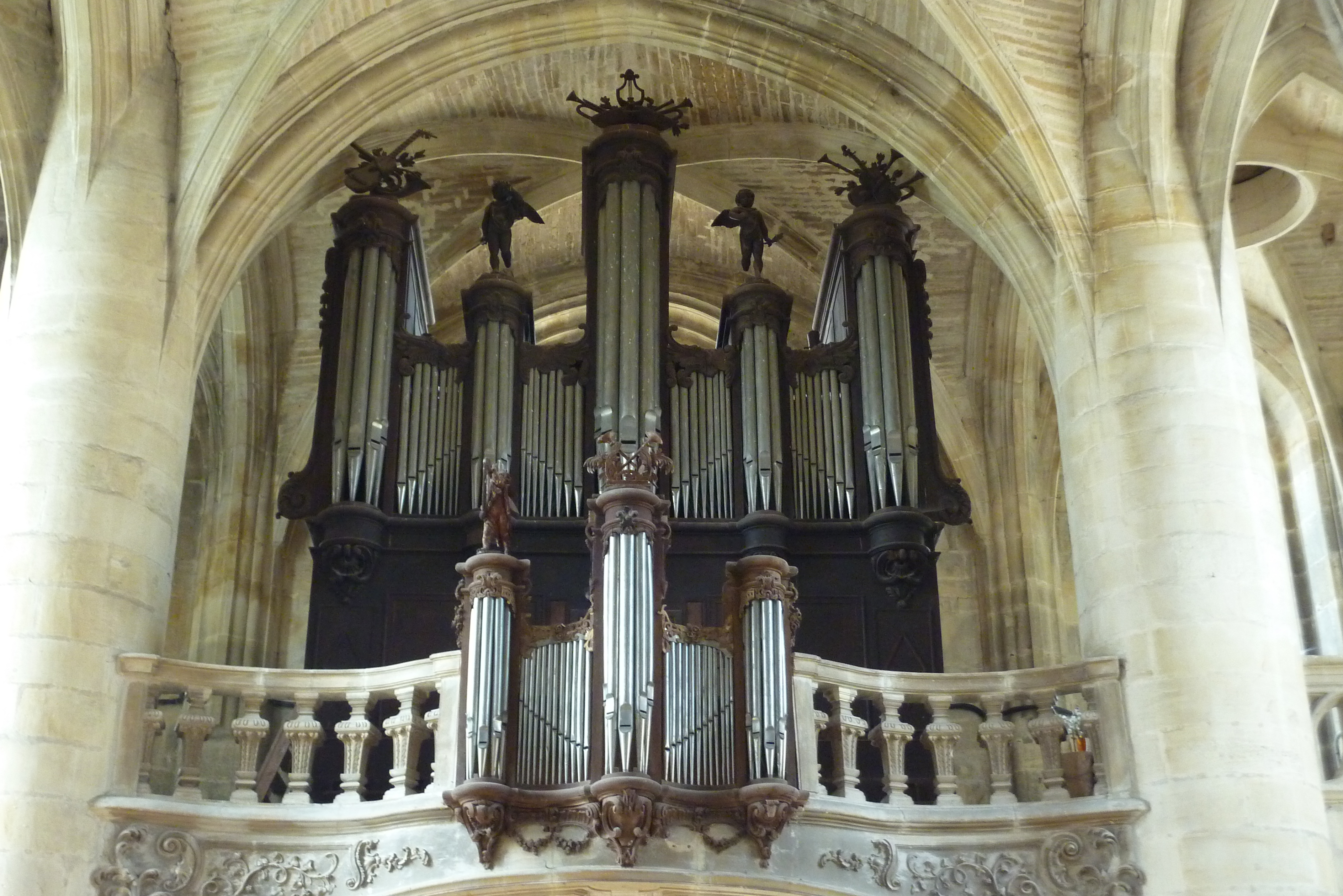 Orgue de tribune de l'église Saint-Étienne de Bar-le-Duc.